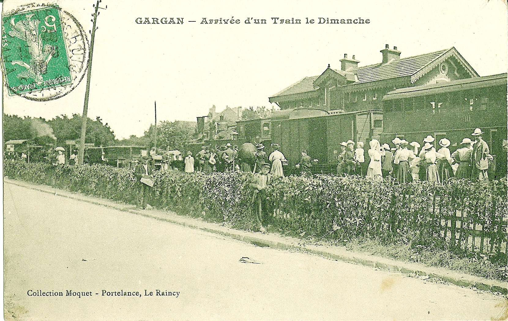 Carte postale ancienne éditée par Moquet - Portelance au RaincyGARGAN : Arrivée d'un train le Dimanche